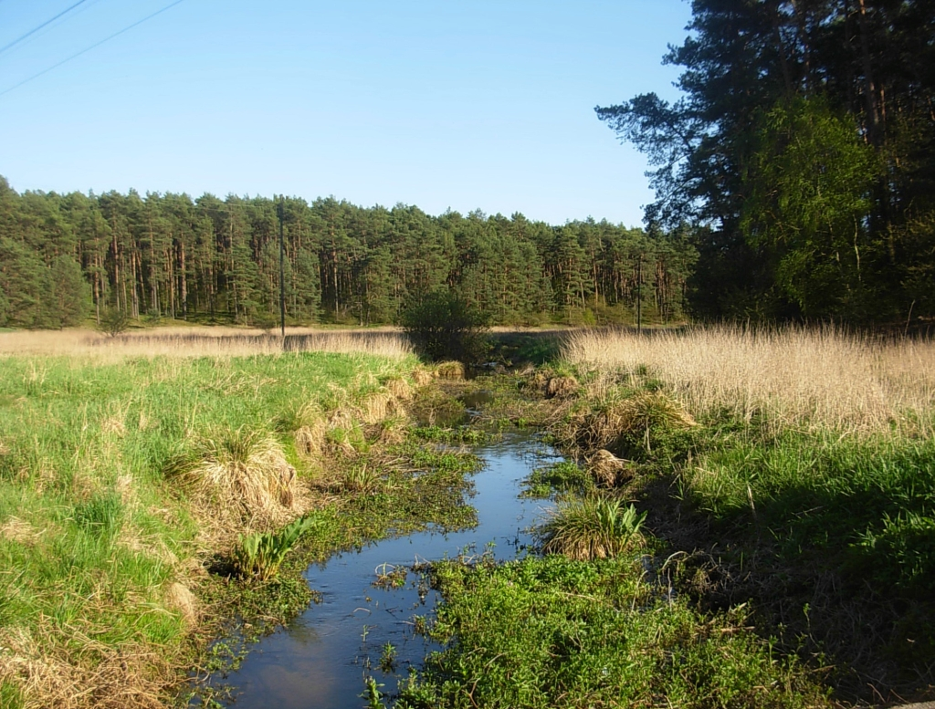 Struga Młyńska – dopływ Kanału Bydgoskiego w dolinie Podprądy na granicy gminy Białe Błota i osiedla Miedzyń w Bydgoszczy